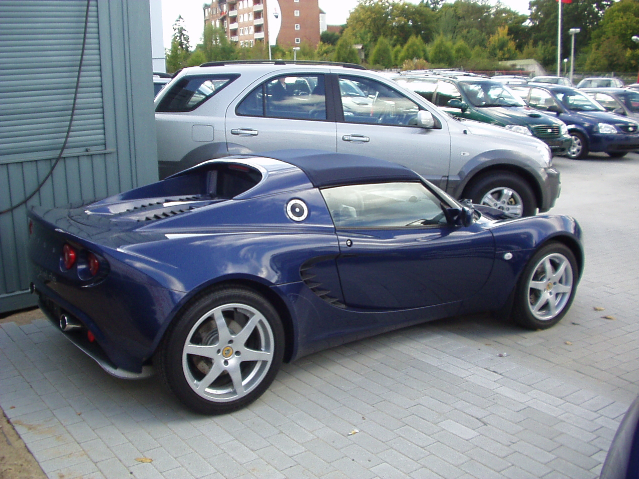 Lotus Elise S2 Seitenansicht